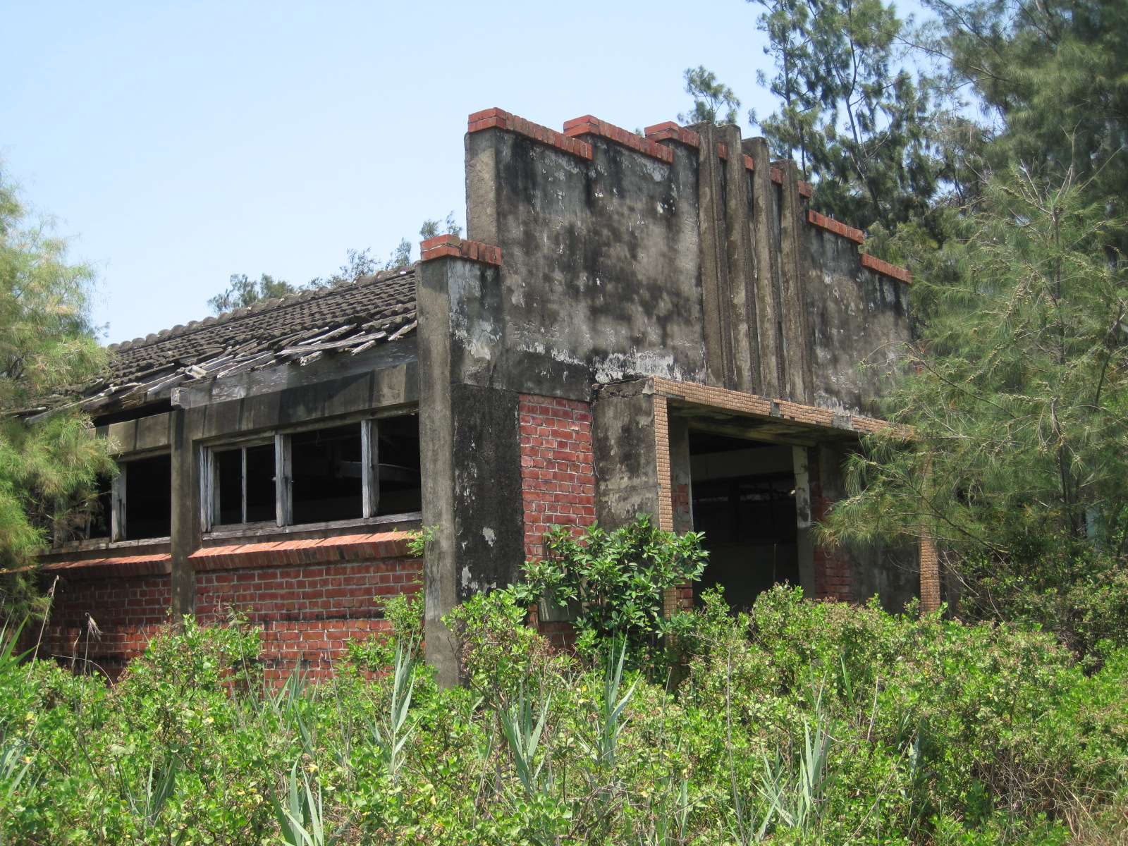 臺鹽七股機車庫西半部，七股鹽場木工訓練班。